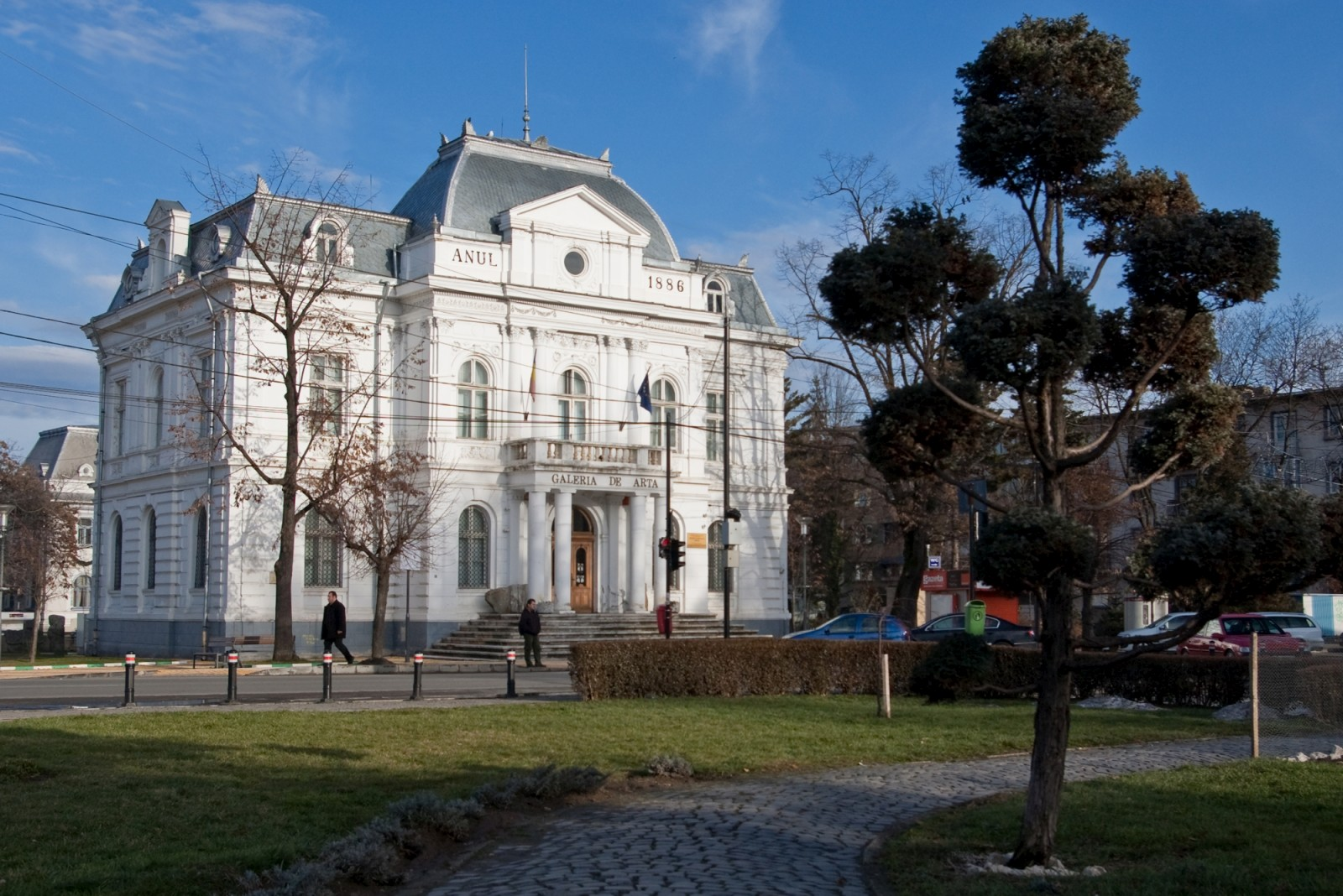 Fotografia prezinta Muzeul de Arta din Pitesti.